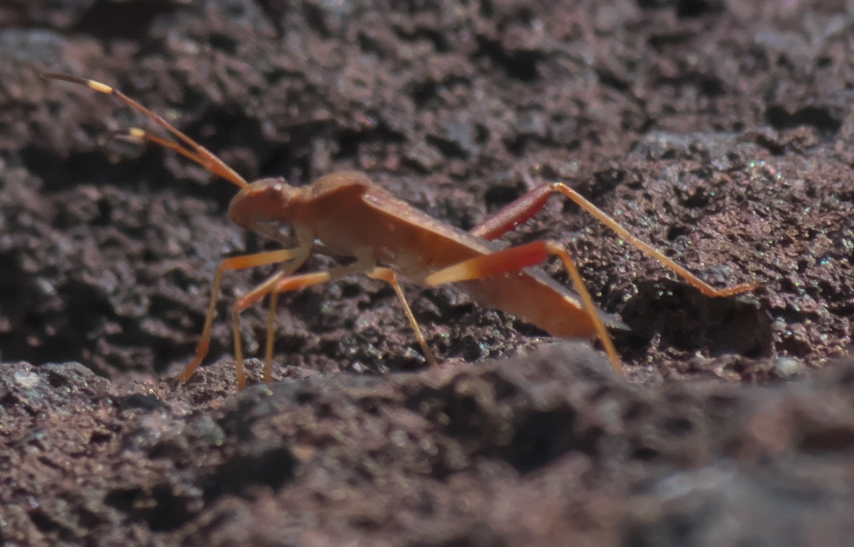 Megalotomus quinquespinosus, Lupine Bug, ID Confidence: 97